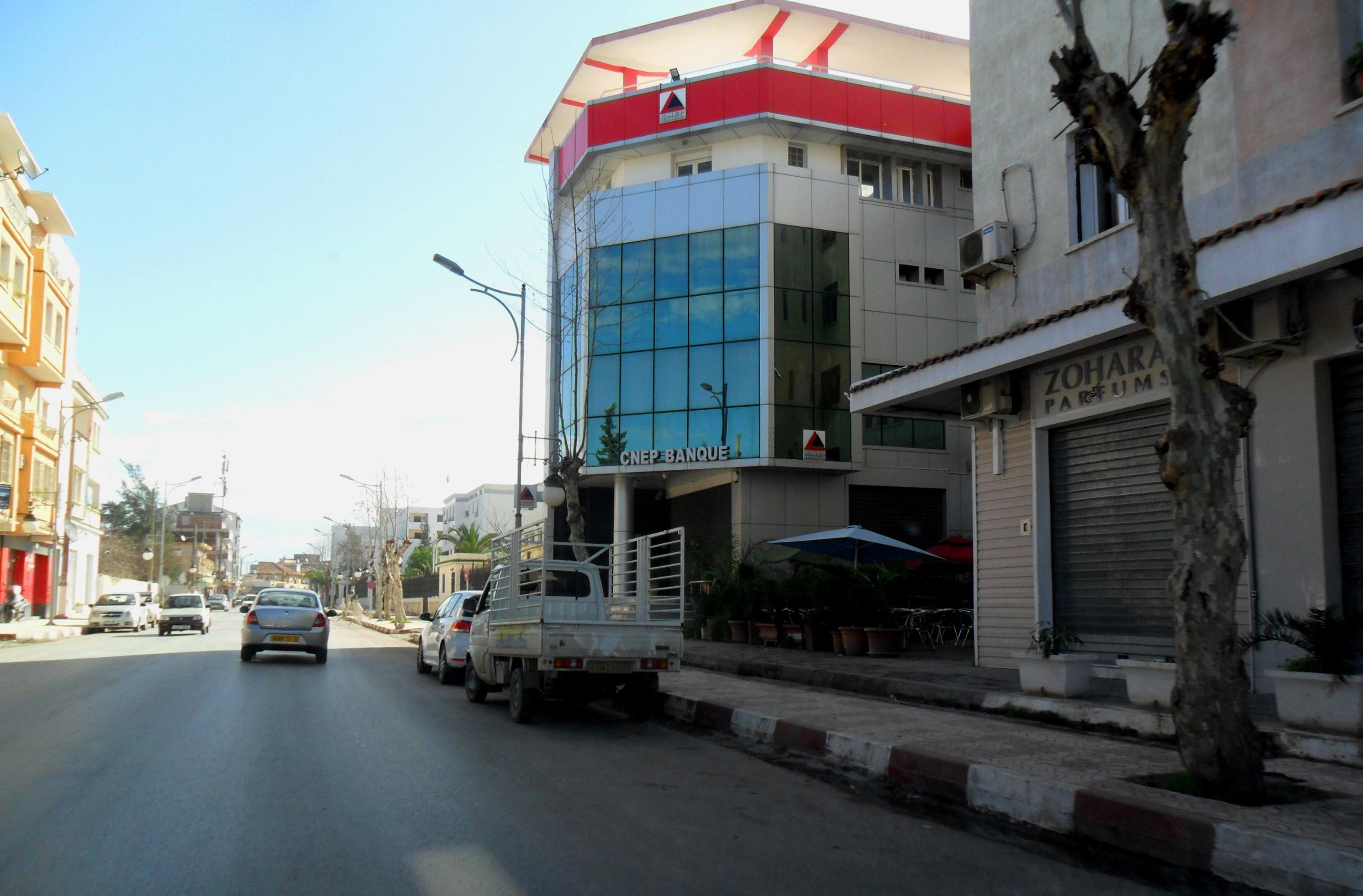 Blida